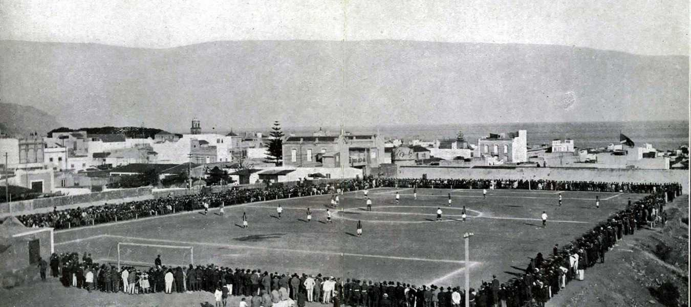 Antiguo Campo de Miraflores (Santa Cruz de Tenerife). Acogío los partidos del CD Tenerife entre 1913-1925